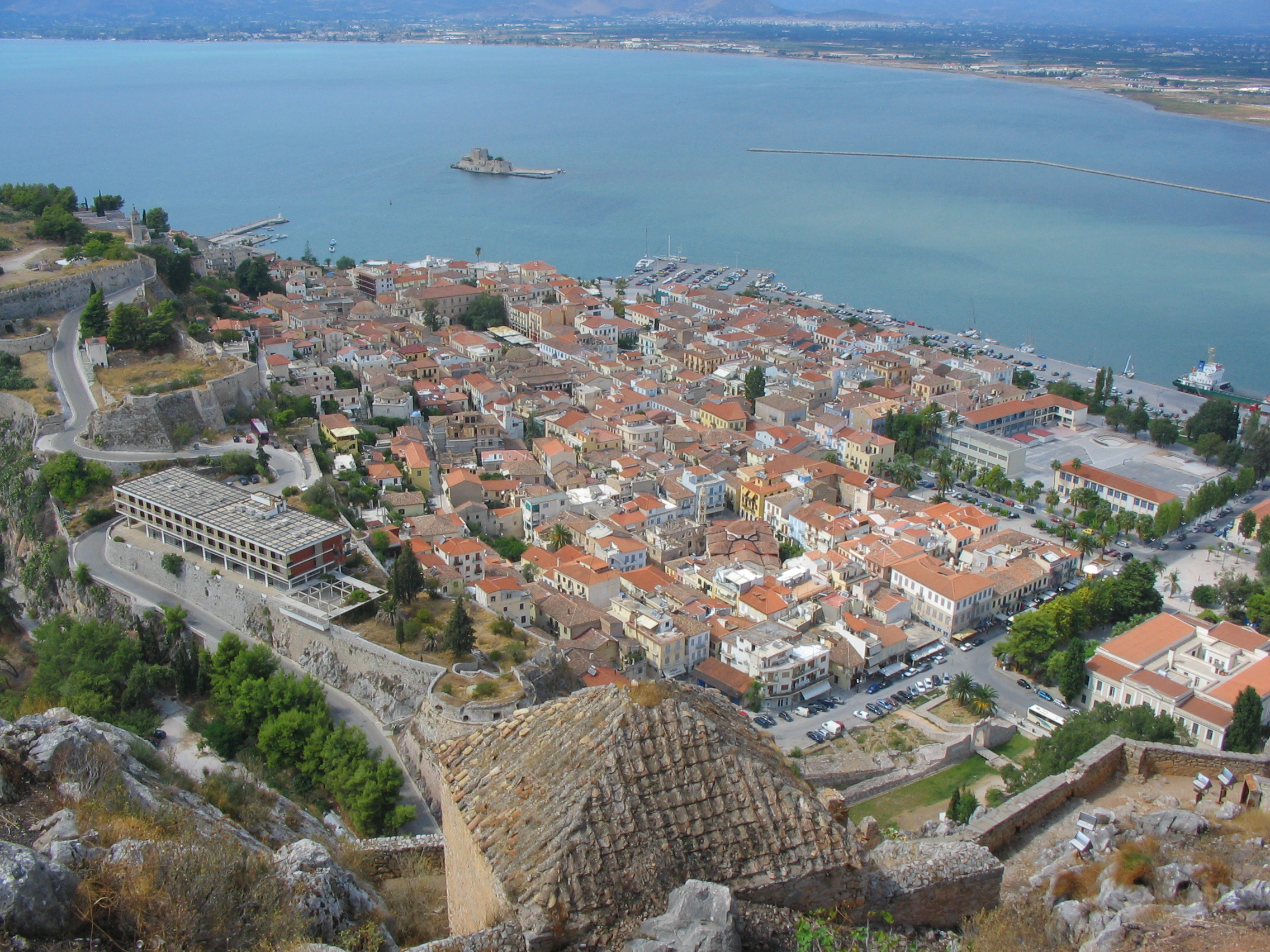 Нафплион из крепости Паламиди